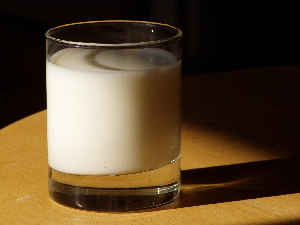 Standaardattributen in de Kroeg.